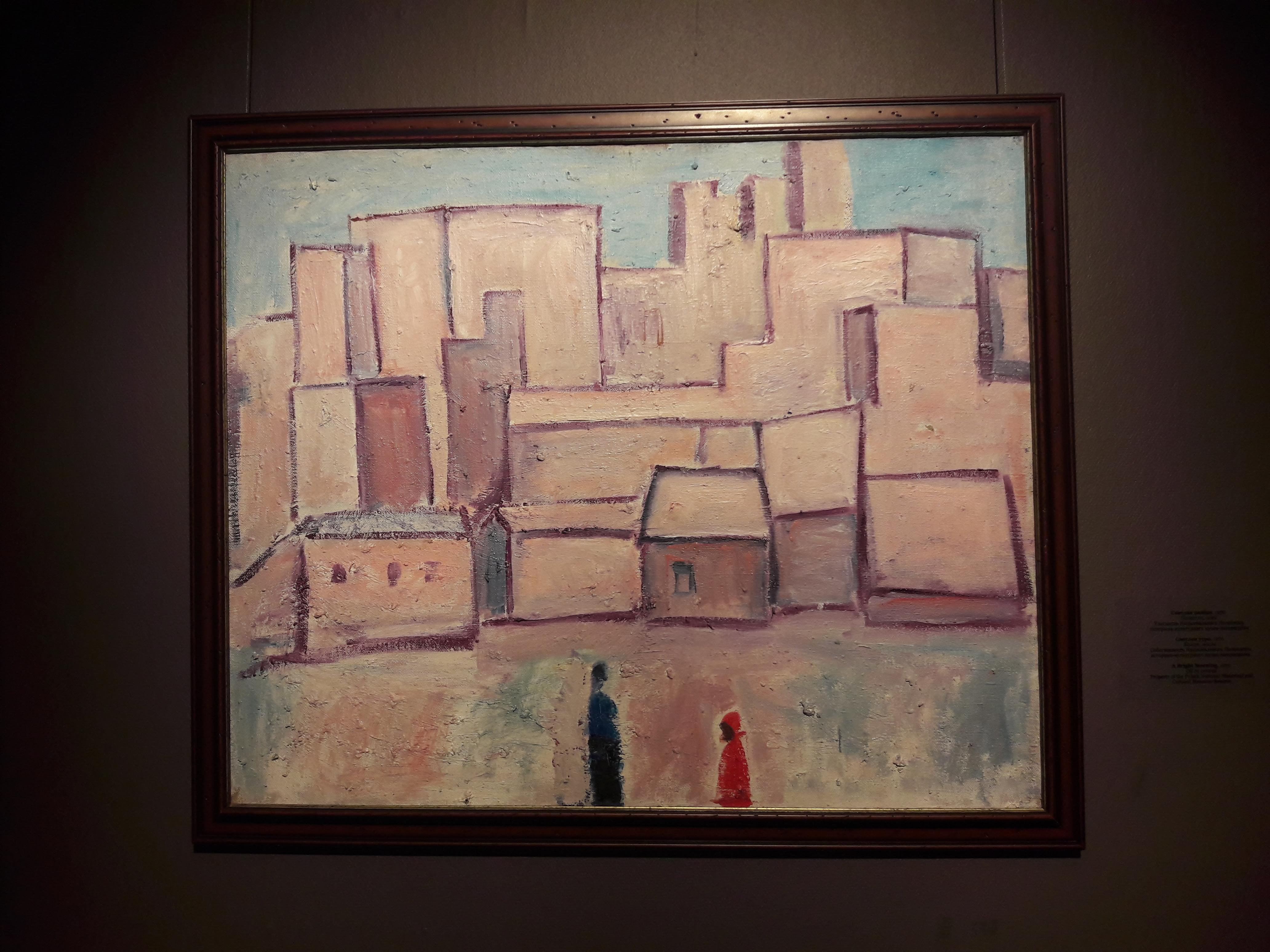 Відарыс палатна. Зроблена ў жніўні 2018г. у Нац. мастацкім музэі Менска на персанальнай рэтраспектыве мастака.